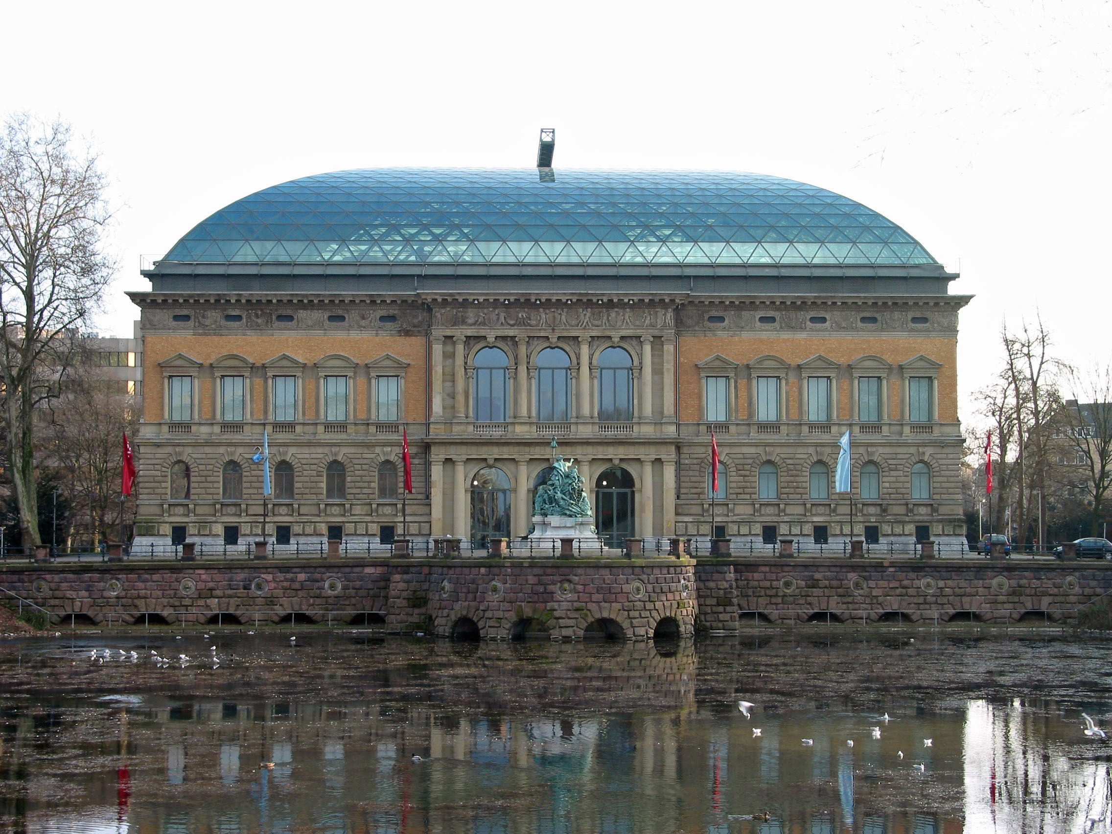 K21 Ständehaus in Düsseldorf, Museum für Kunst des 21. Jahrhunderts